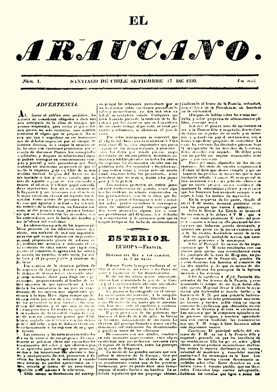 Portada del primer número de El Araucano.